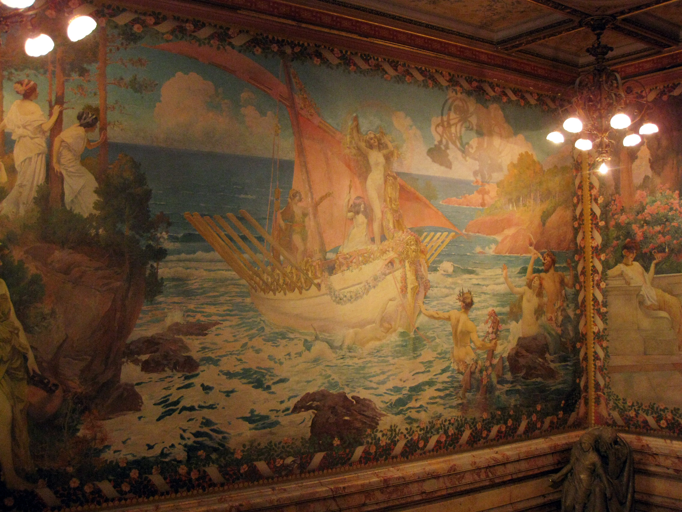 Casa Pams (Perpinyà), pintures de l'escala, de Paul Jean Gervais .